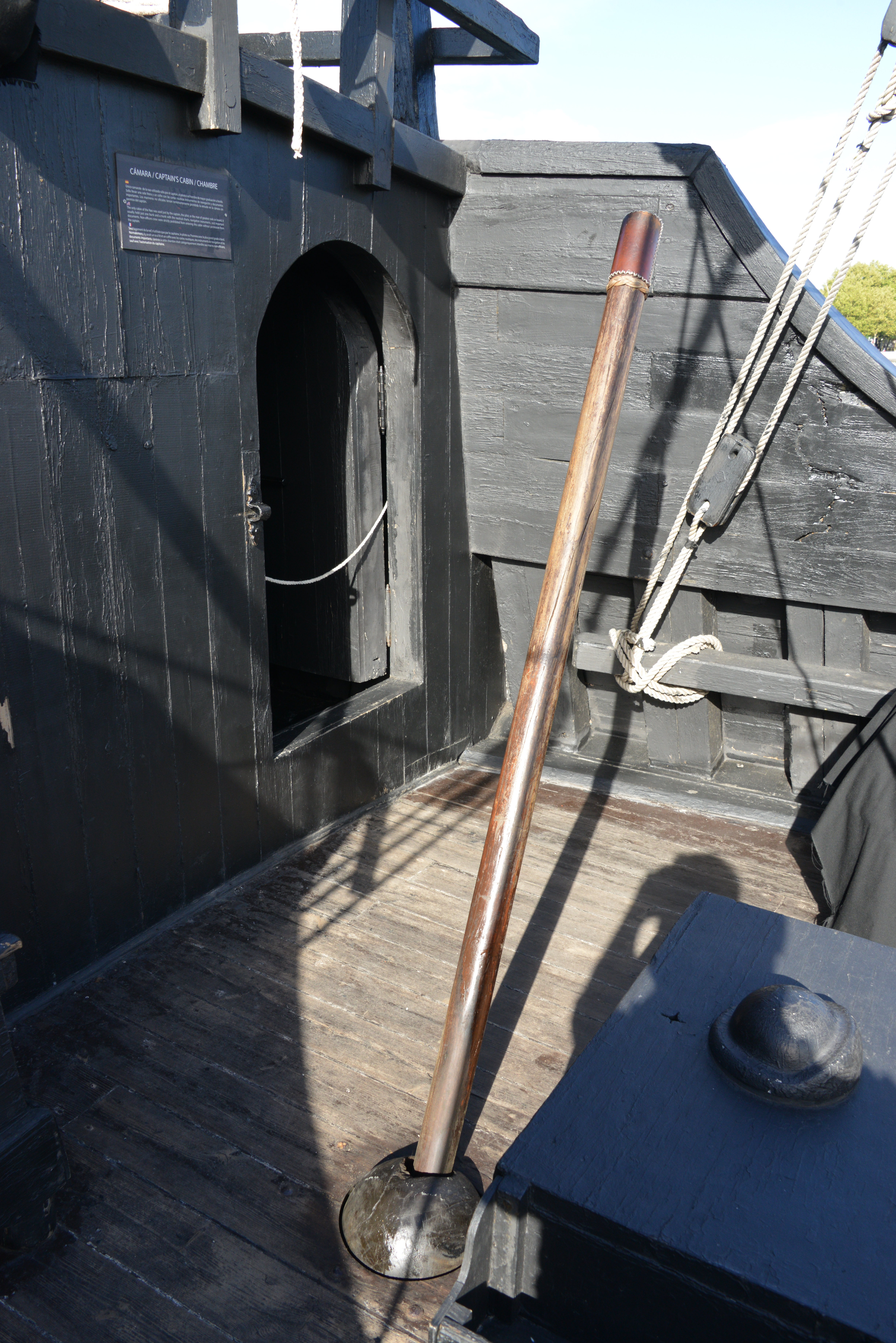 Le système permettant de manœuvrer le safran: le fouet (whipstaff), cet instrument traverse le pont de la timonerie et est relié à la barre située en dessous, on le fait osciller à droite et à gauche. La Rochelle, Charente-Maritime, France